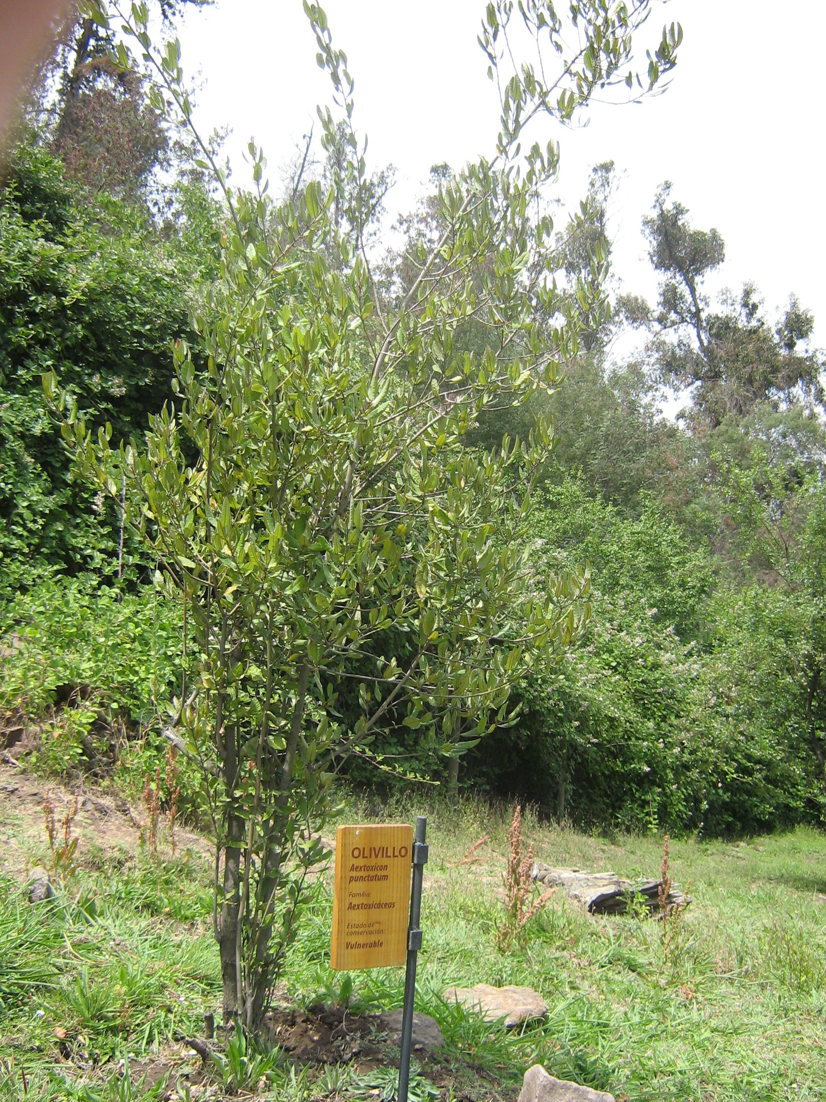 Aextoxicon punctatum, ex hortus, Mapulemu Santiago de Chile